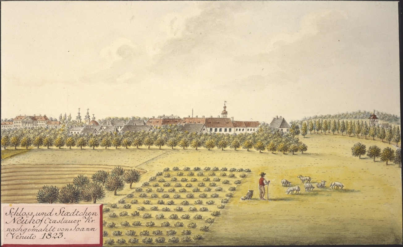 Zámek a městys Nové Dvory. Schloss und Staedtchen Neuhof Czaslauer Kr. nachgemahlt von Joann Venuto 1823